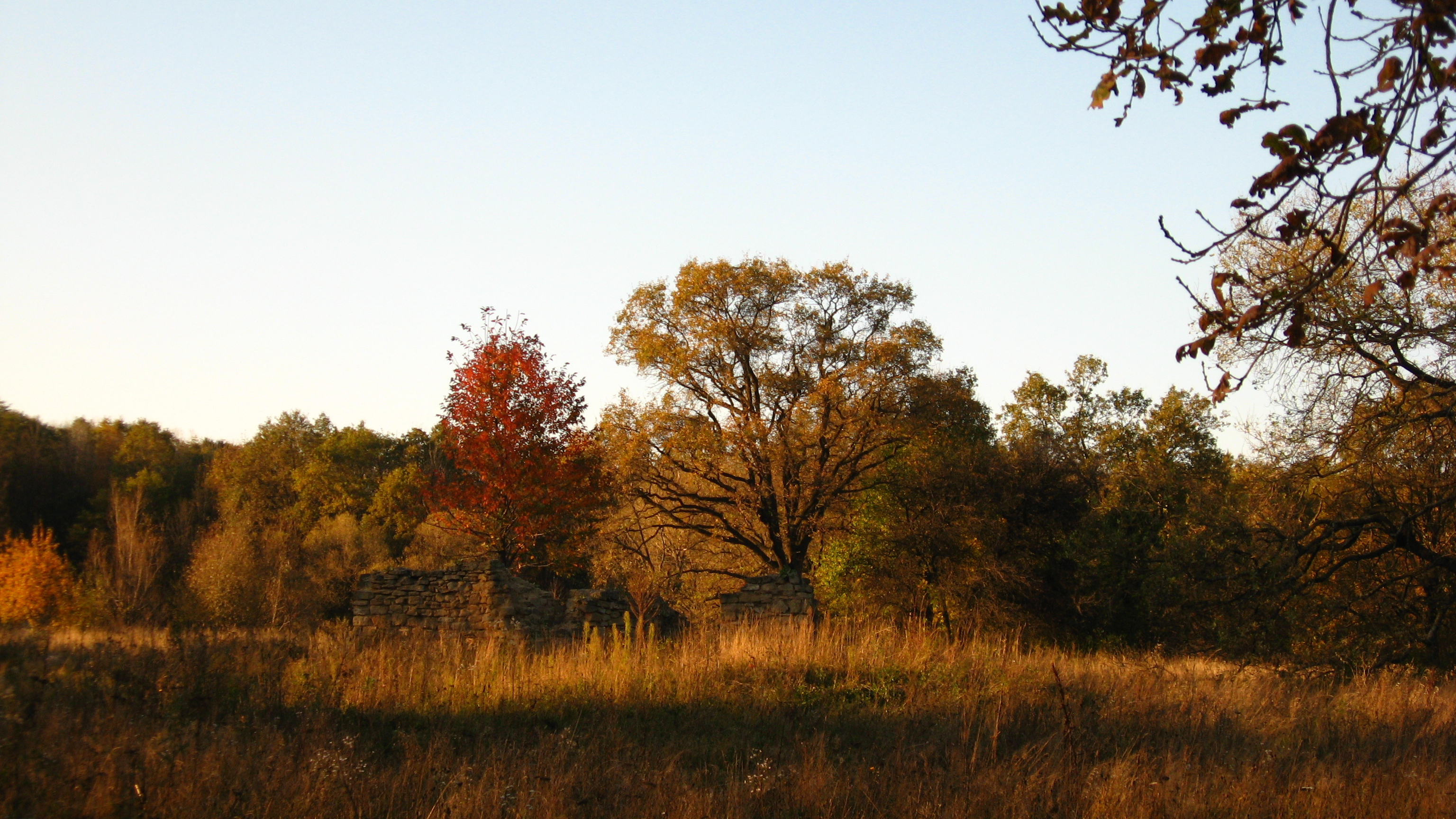 Ruinele schitului din "Poiana cu schit"